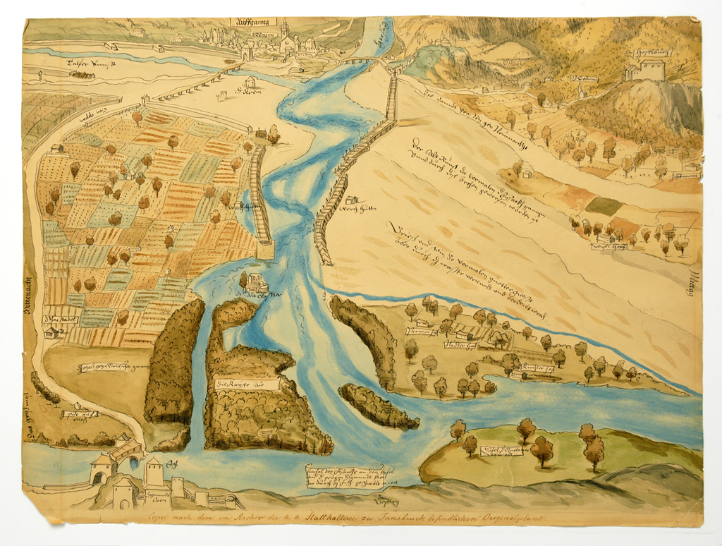 Immagine del '500, fatta dall'allora borgomastro di Bolzano L. Hörtmair (1541)